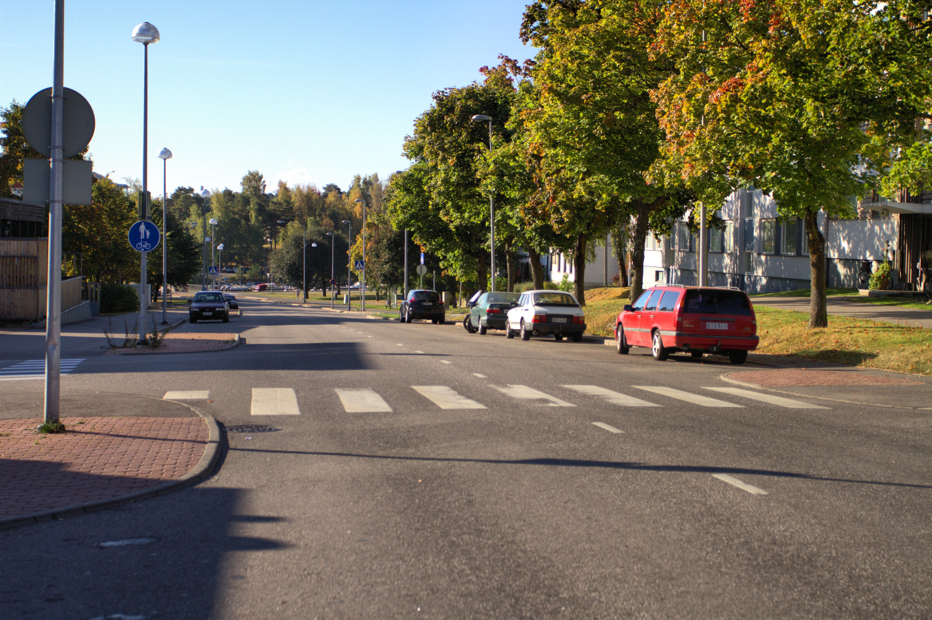 Lahdenkatu Syvärauman kaupunginosassa.